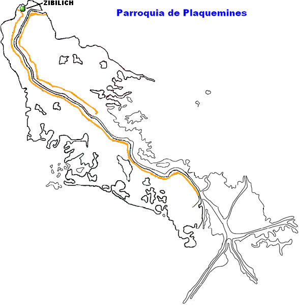 Zibilich, Louisaina.